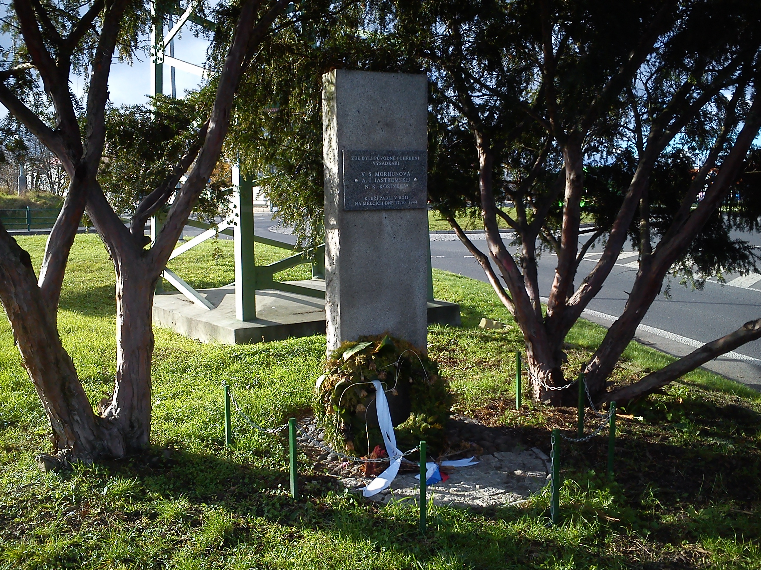 Památník pohledem zepředu od východu